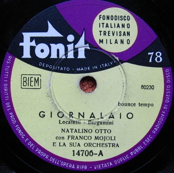 Etichetta del lato A del 78 giri Fonit con la canzone 'Giornalaio'